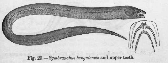 Symbranchus bengalensis = Ophisternon bengalense McClelland, 1844